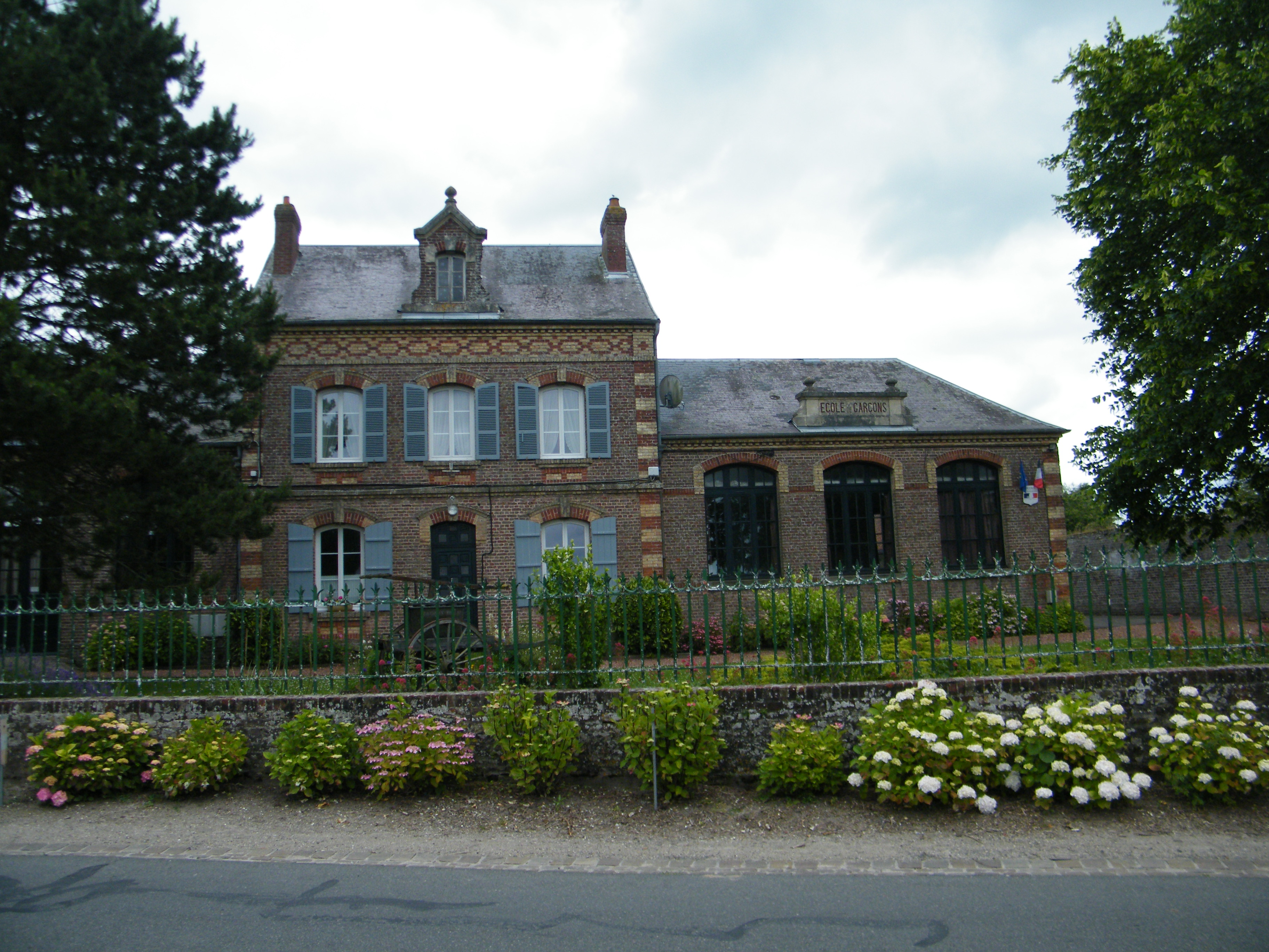 Mairie-école de Ponthoile. L'école à deux classes ferme en juin 2018.